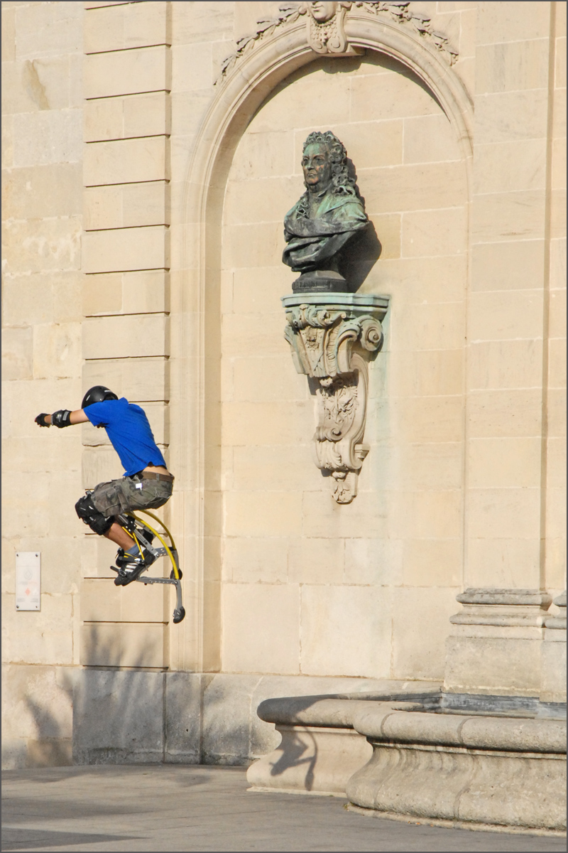 Les échasses urbaines sont un paire d’échasses à ressort permettant de sauter, courir et faire des activités sportives de toutes sortes.